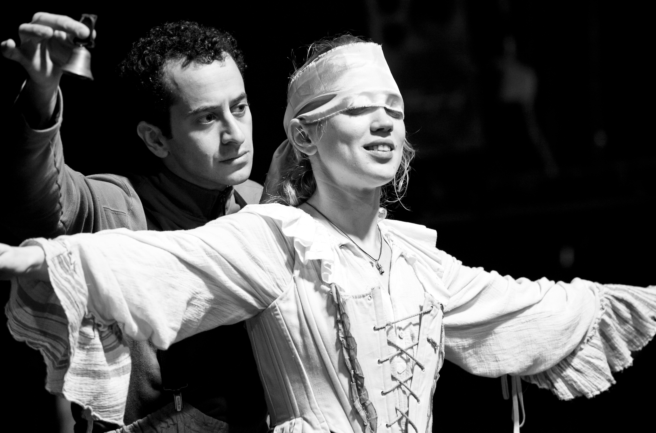 אורי יניב בהצגה בתיאטרון גשר